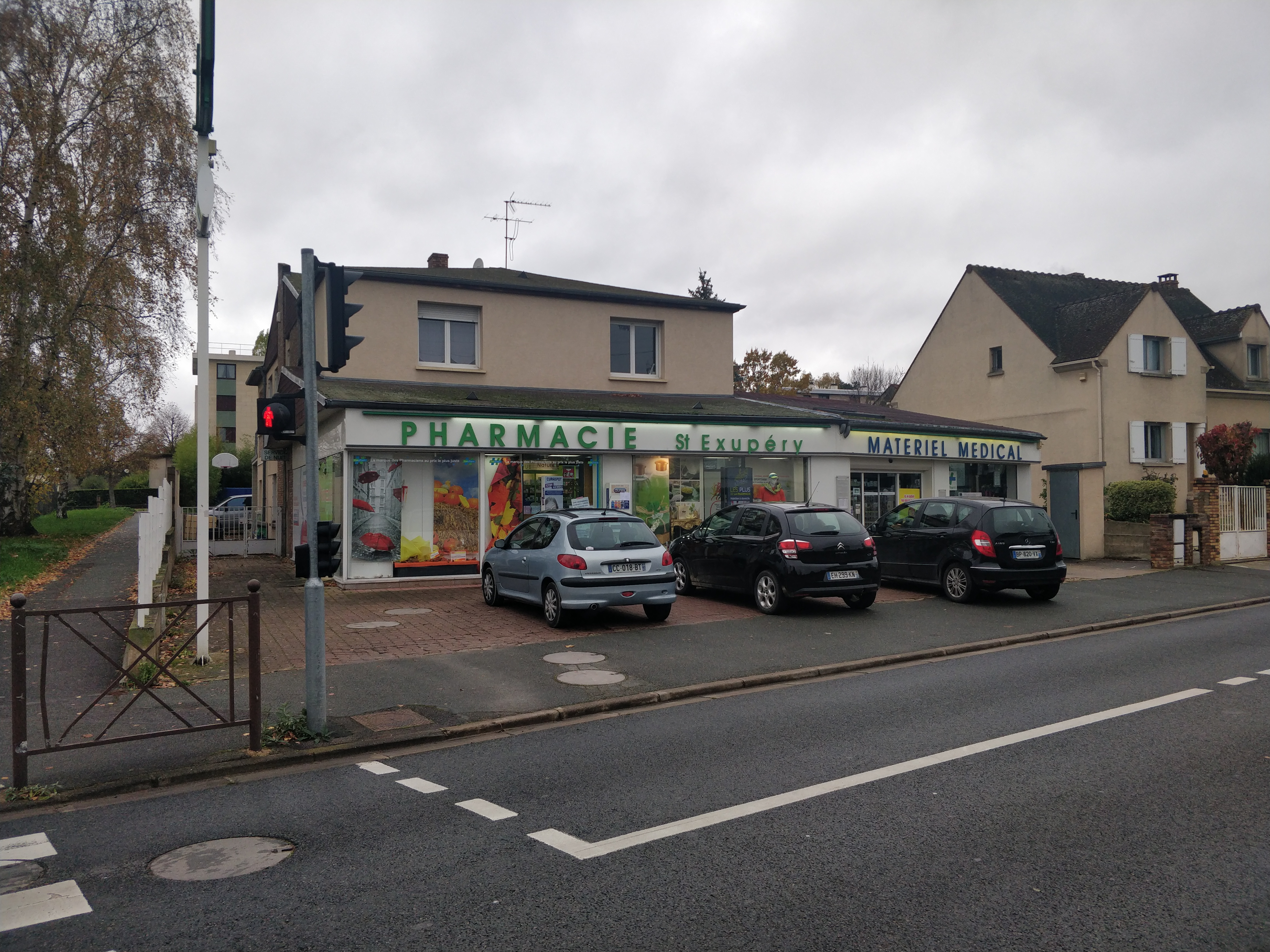 Pharmacie Saint-Exupéry à Wissous.